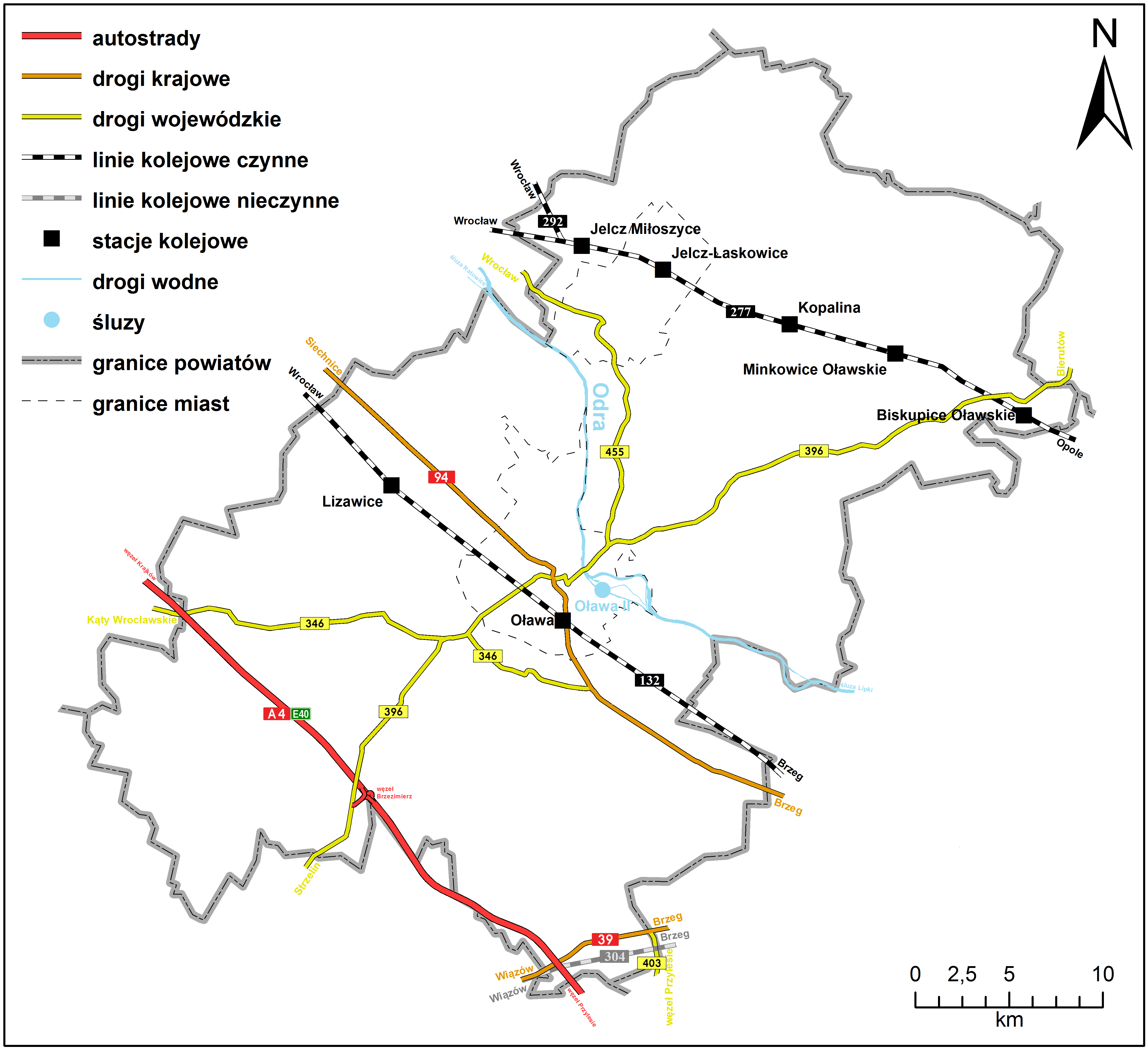 Sieć komunikacyjna powiatu oławskiego